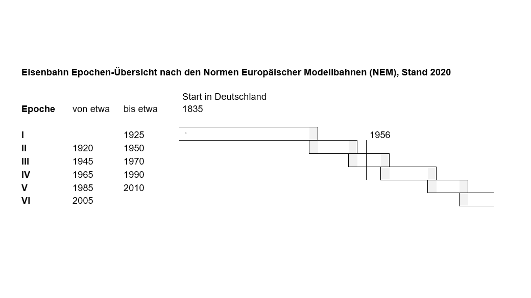 Übersicht der Eisenbahn Epochen nach den Normen Europäischer Modellbahnen (NEM) Nummer 800 mit Stand 2007. Die Epochen sind auf der zeitlichen Achse in den Proportionen korrekt wiedergegeben. Gut sichtbar die zeitlich überlange Epoche I, die wiederholt unter den Hobby Modelleisenbahner und Eisenbahner zu Diskussionen bezüglich einer allfälligen Epoche 0 führt, da die Epoche I die gesamte Entwicklung der Eisenbahngeschichte von der filigranen Dampflokomotive bis zur leistungsfähigen Elektrolokomotive für hochgespannten Wechselstrom wiedergibt. Eisenbahn Epochen-Übersicht nach den Normen Europäischer Modellbahnen (NEM), Stand 2007, 2020: Epoche I: Bis etwa 1925 Epoche II: Von etwa 1920 bis etwa 1950 Epoche III: Von etwa 1945 bis etwa 1970 Epoche IV: Von etwa 1965 bis etwa 1990 Epoche V: Von etwa 1985 bis etwa 2010 Epoche VI: Ab etwa 2005 Die Markierung des Jahres 1956 wiederspiegelt den Zeitpunk der Klassenreform.